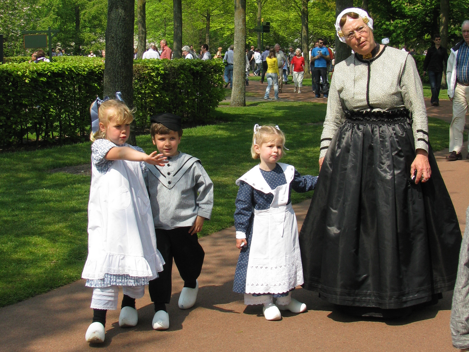 Keukenhof